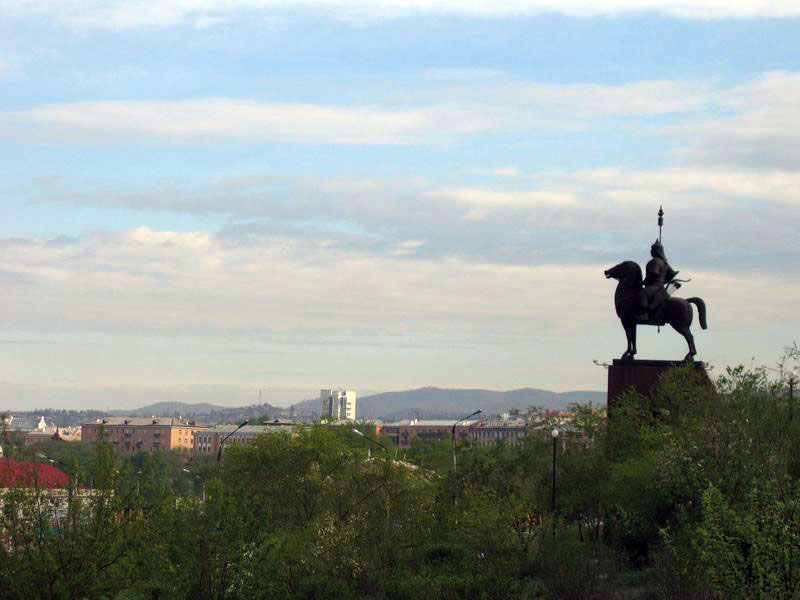 Вид с моста на памятник "Гэсэр"